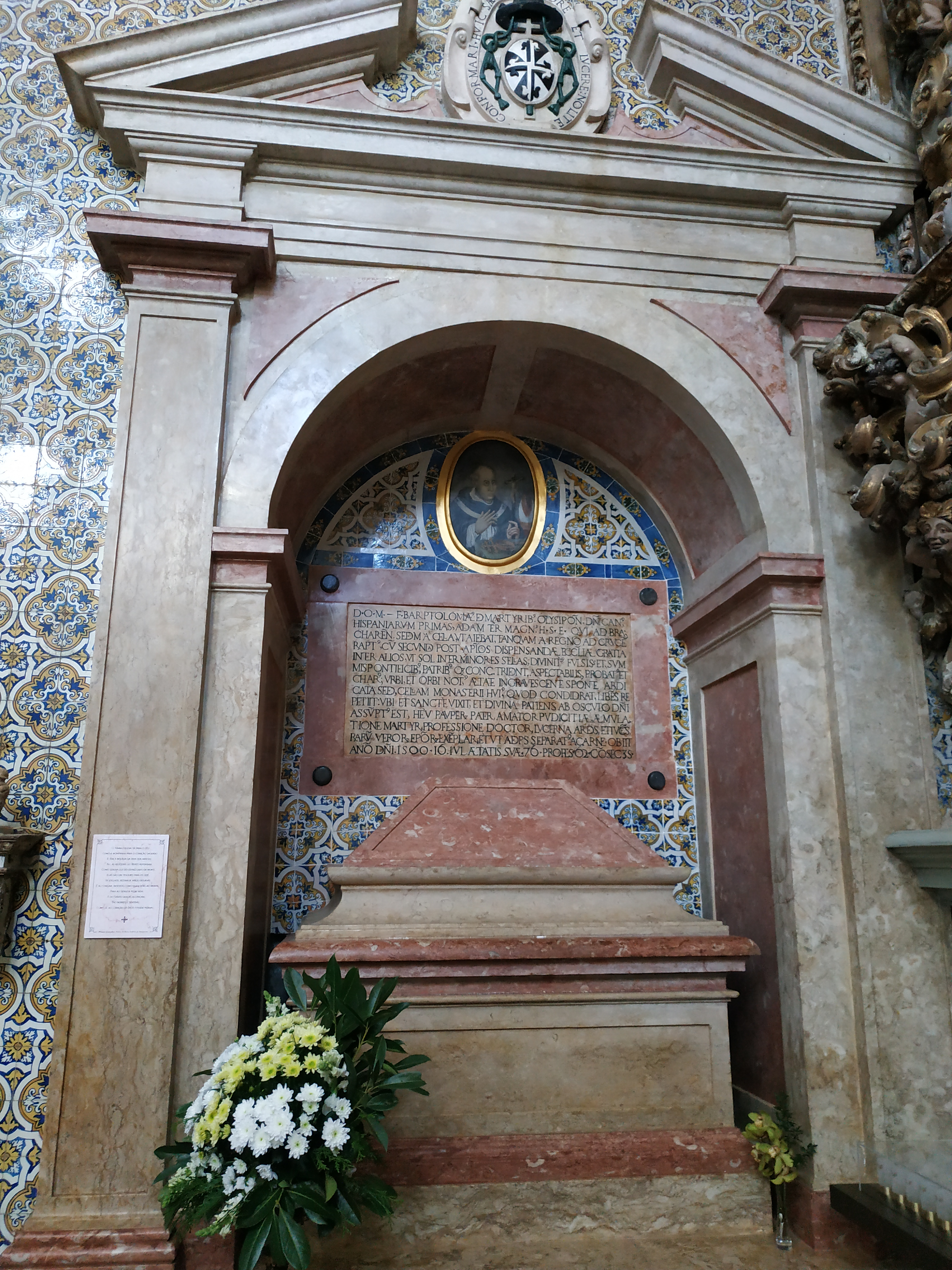 Viana do Castelo City Portugal